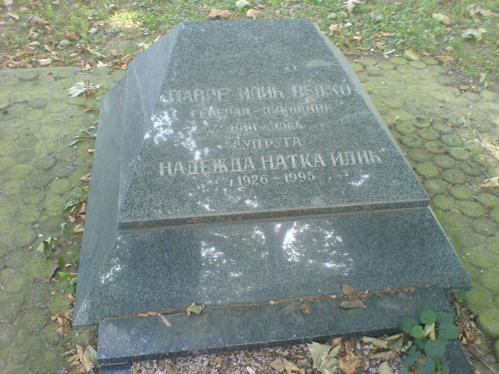 Grob Pavla Ilica Veljka